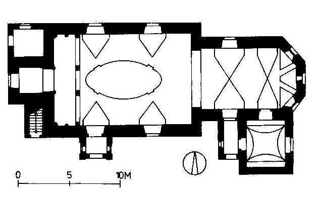 Grundriss der Kirche von Unterdürnbach